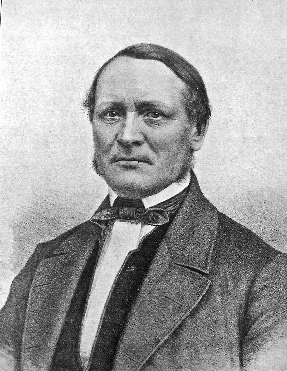 Jens Andersen Hansen, kendt som J.A. Hansen (udtales I.A. Hansen), (1806-1877), dansk politiker (bondeven, senere venstremand), først skomager, senere redaktør.